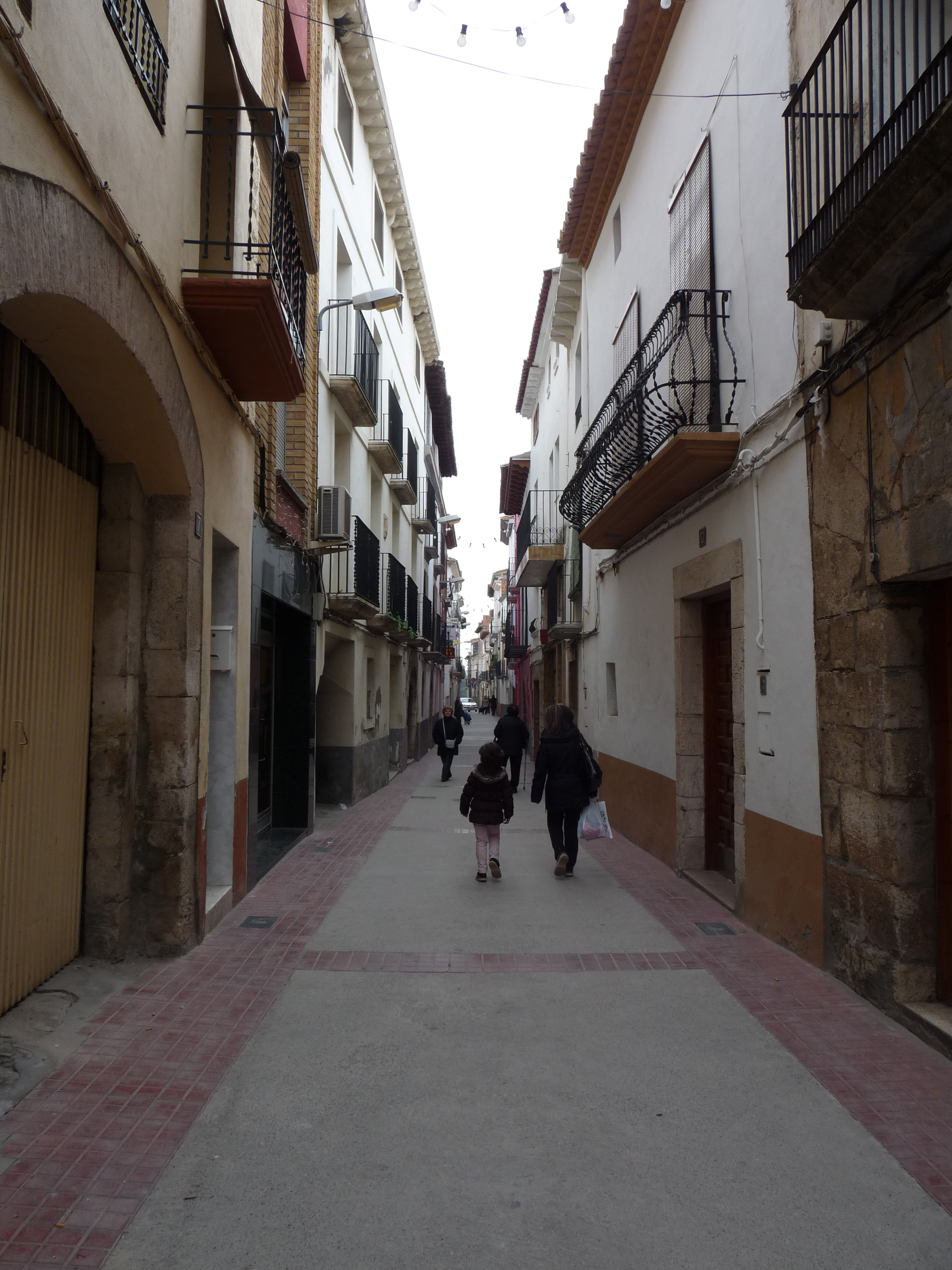 Zaidín - Calle Mayor